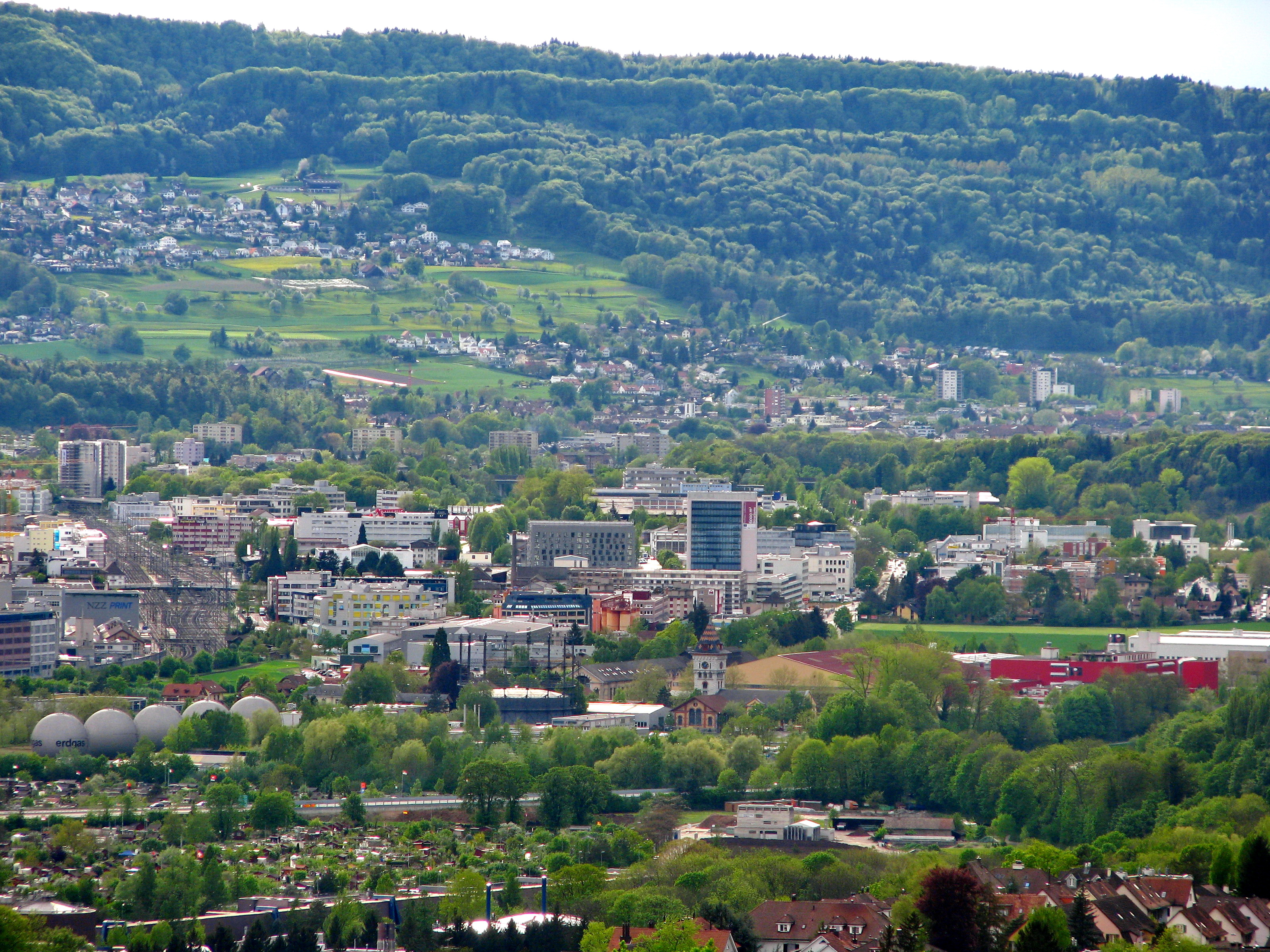 Schlieren, Bergdietikon (to the left) and Dietikon (to the right) in Limmtatal, seen from Käferberg-Waidberg in Zürich